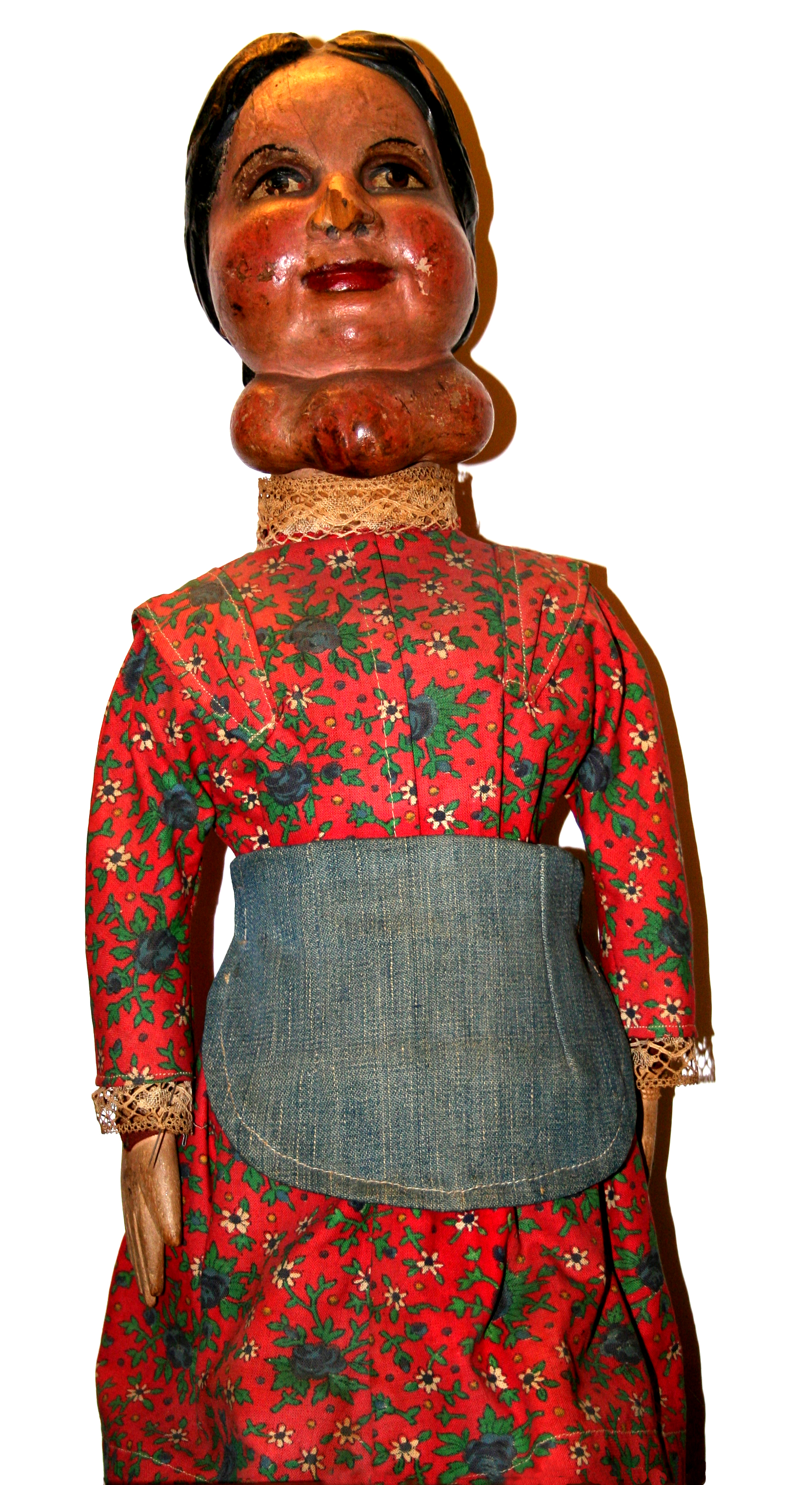 Autore Giorces. Margì, moglie di Giopì, maschera bergamasca.